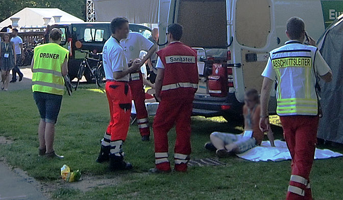 Kennzeichnungsweste beim Sanitätswachdienst